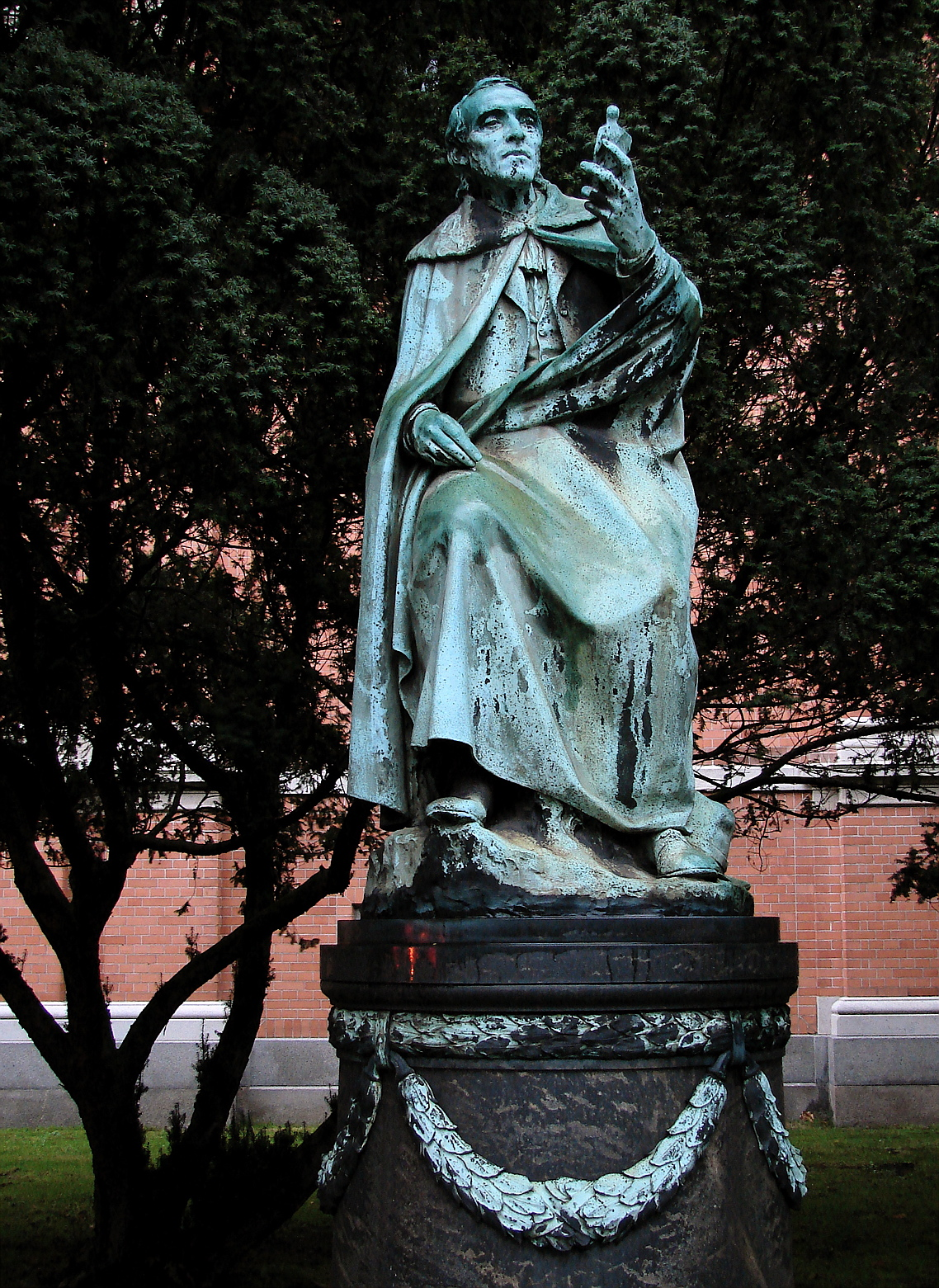 Georg Zoëga (arkæolog, 1755-1809), Ludvig Brandstrup (1861-1935), København